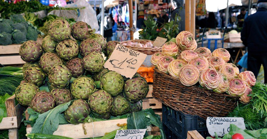 Carciofi tipo romanesco detto anche mammolo o cimaroli. Italia